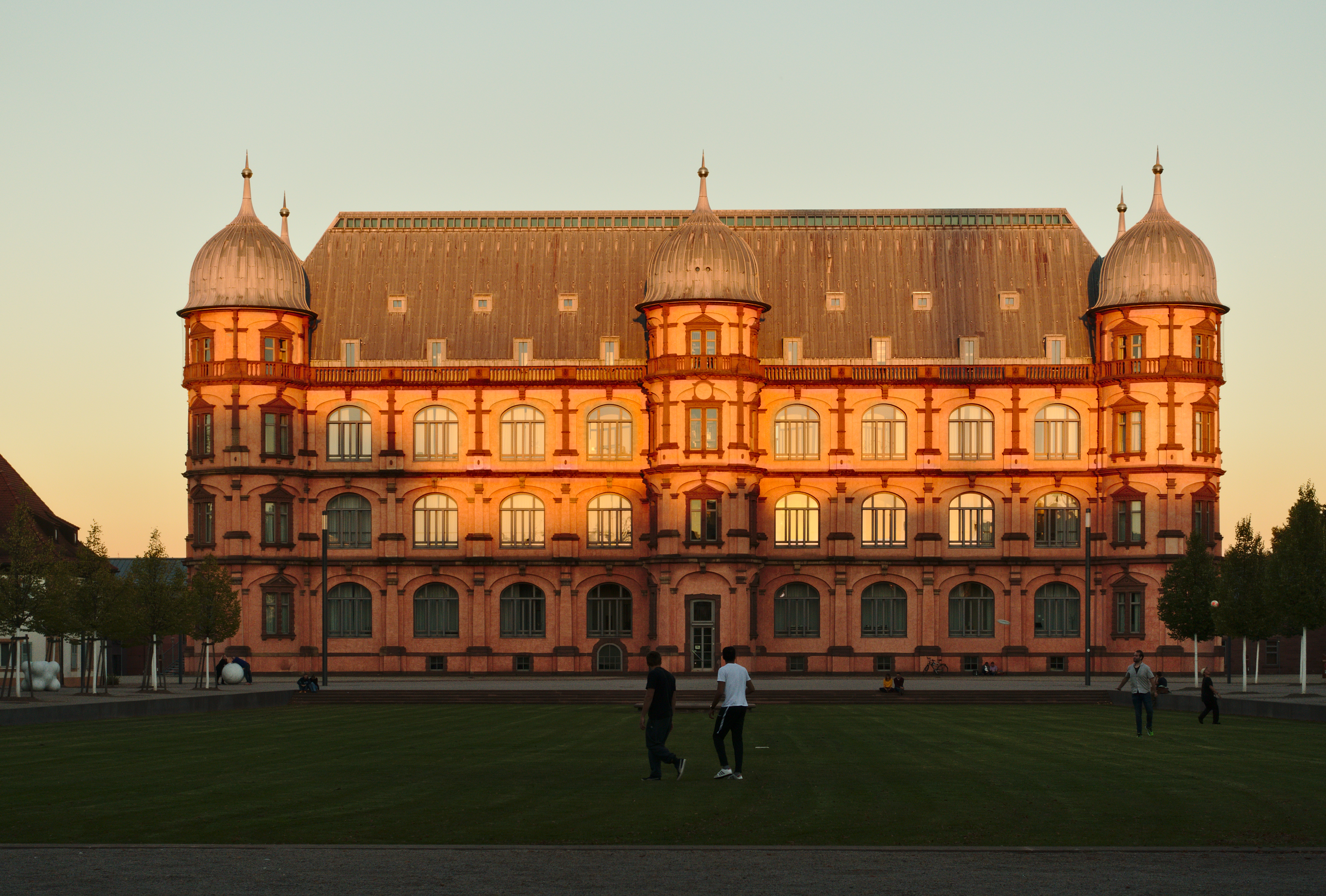 Schloss Gottesaue, jetzt Staatliche Hochschule für Musik, in Karlsruhe, Deutschland